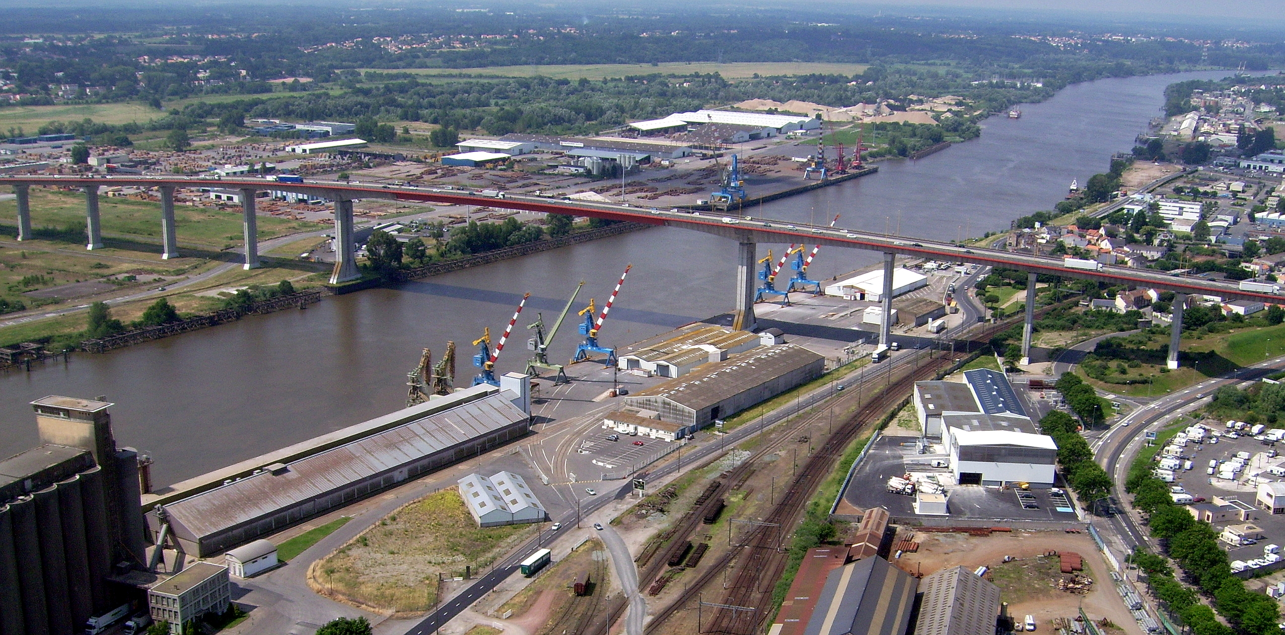 Vue aérienne du pont de Cheviré franchissant la Loire, à Nantes (France). Au premier plan, le terminal portuaire de Roche-Maurice et de l'aute côté de la Loire, le terminal de Cheviré